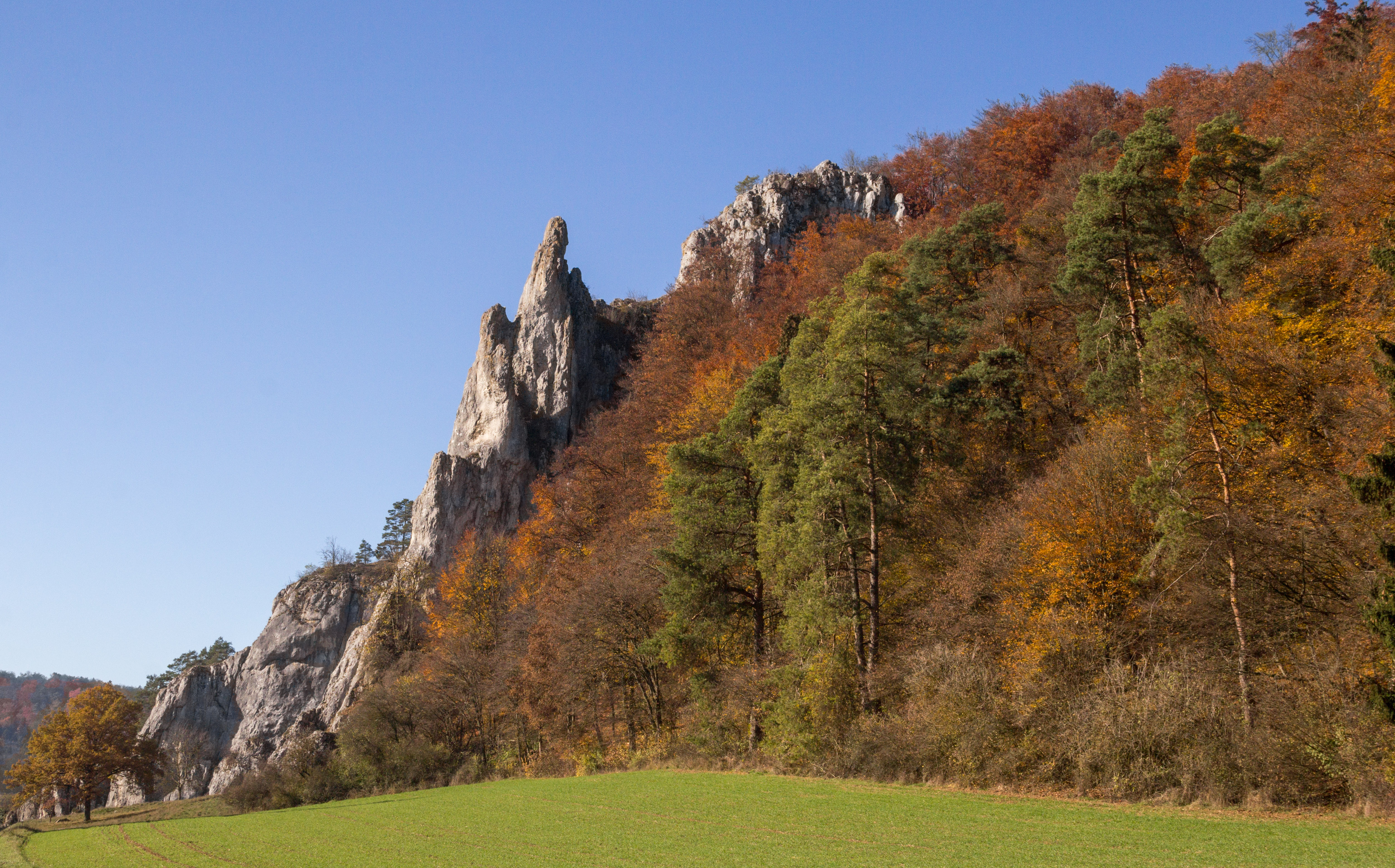 Wellheim, Dohlenstein, Geotop